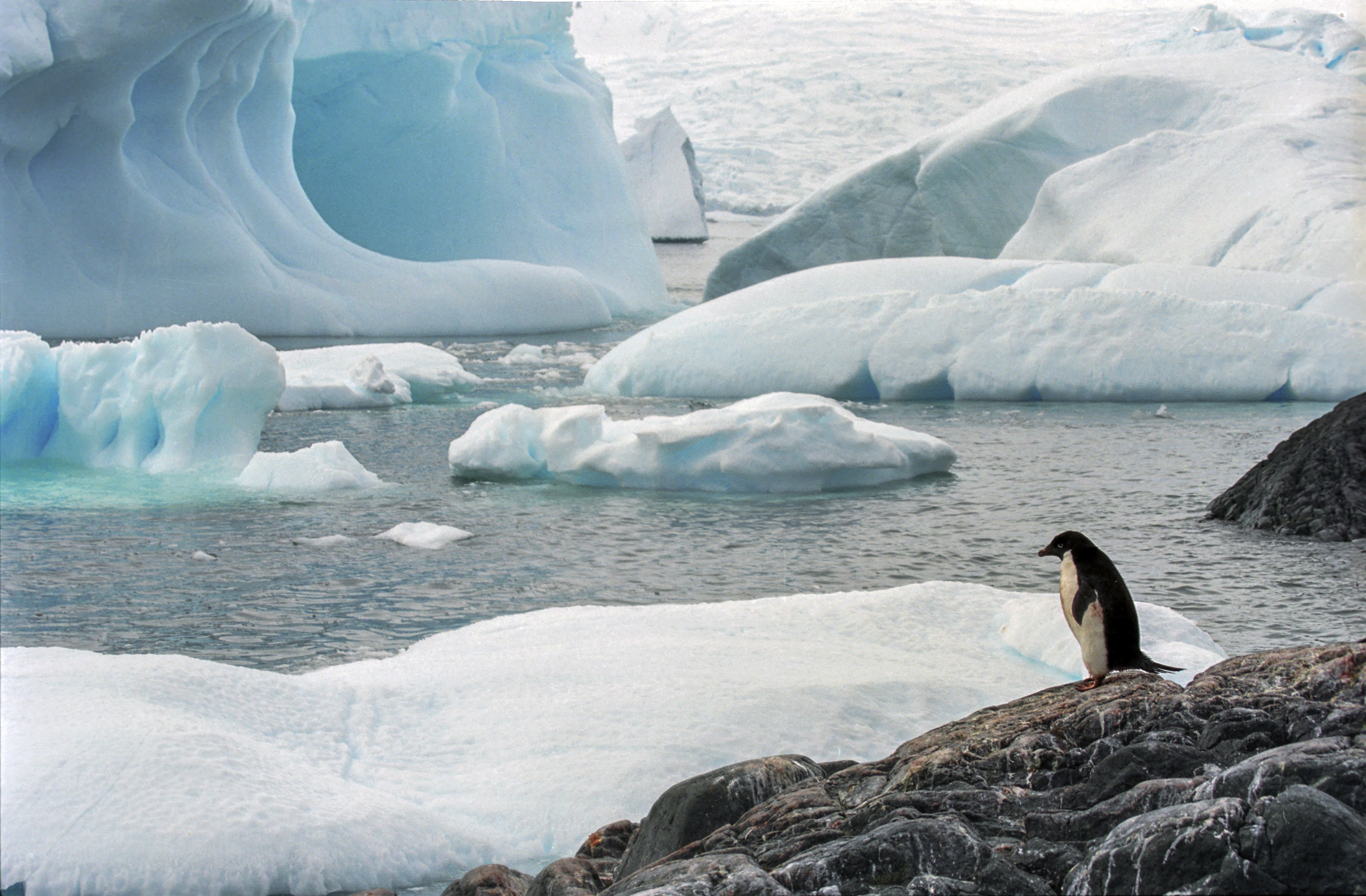 Antarctic